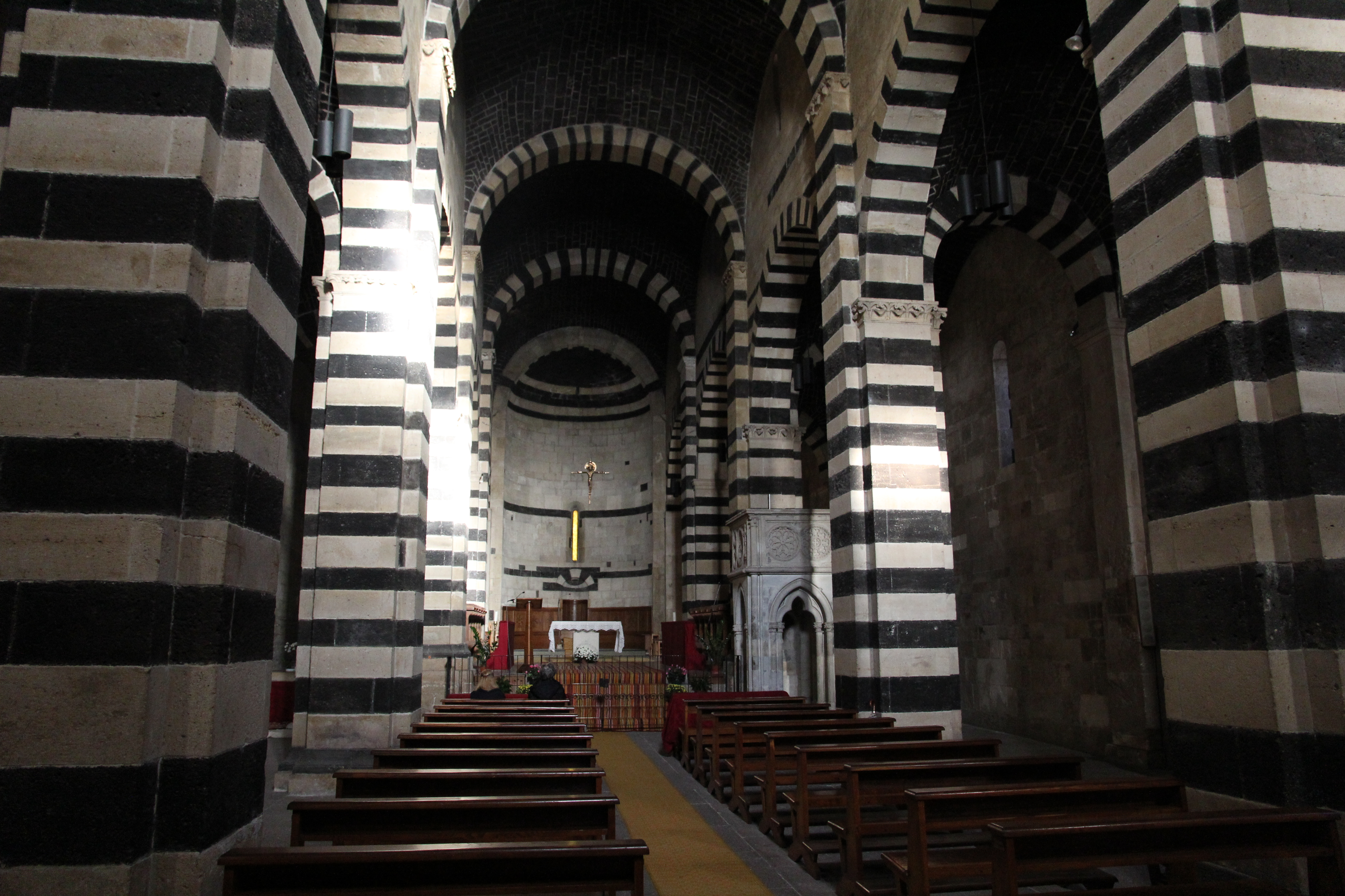 Borutta - Chiesa di San Pietro di Sorres